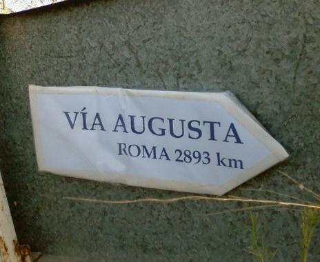 Cartel indicativo de la distancia hasta Roma desde El Puerto de Santa María por la Vía Augusta.